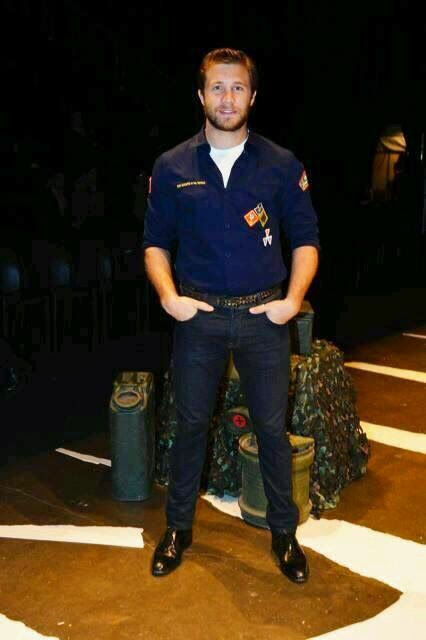 Nico Riera en el Bafweek 2014